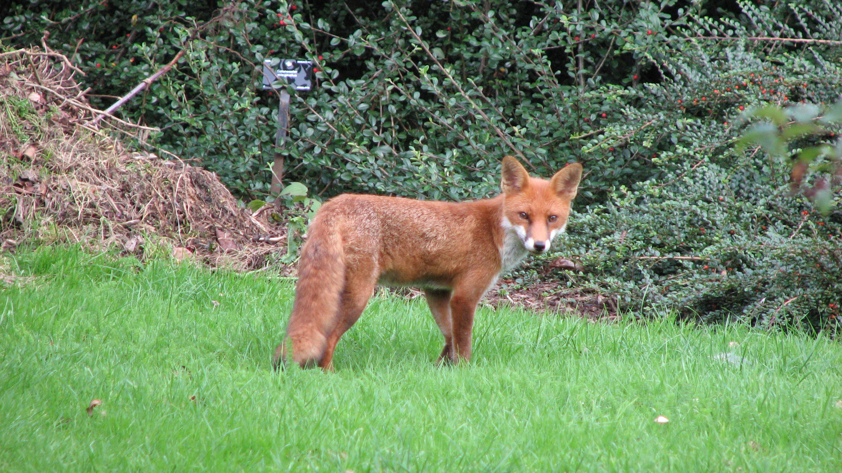 Kew Gardens - London - September 2008